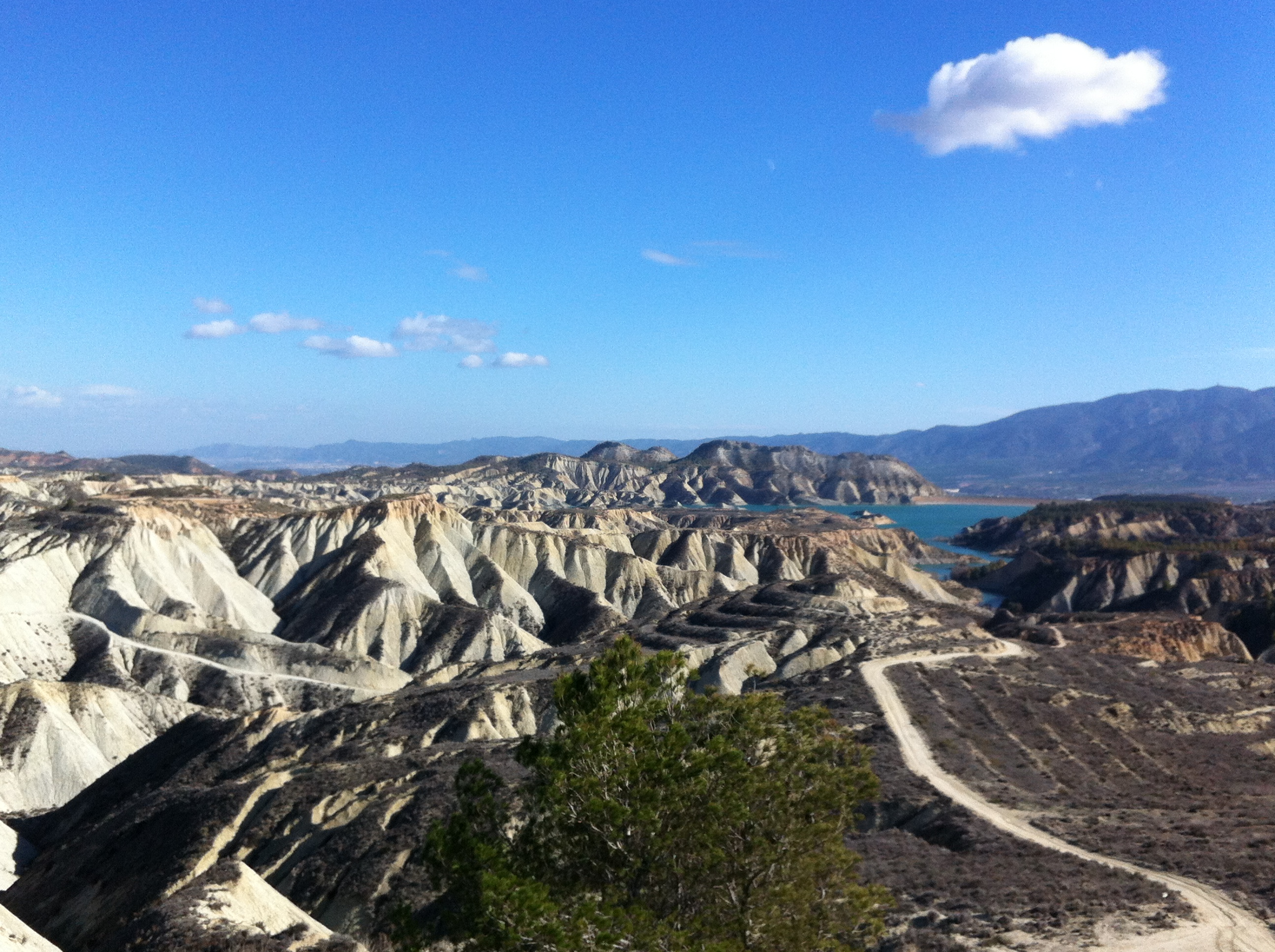 Vista del paraje de los Barrancos de Gebas (espacio protegido), con el embalse de la Rambla de Algeciras al fondo (Región de Murcia, España).